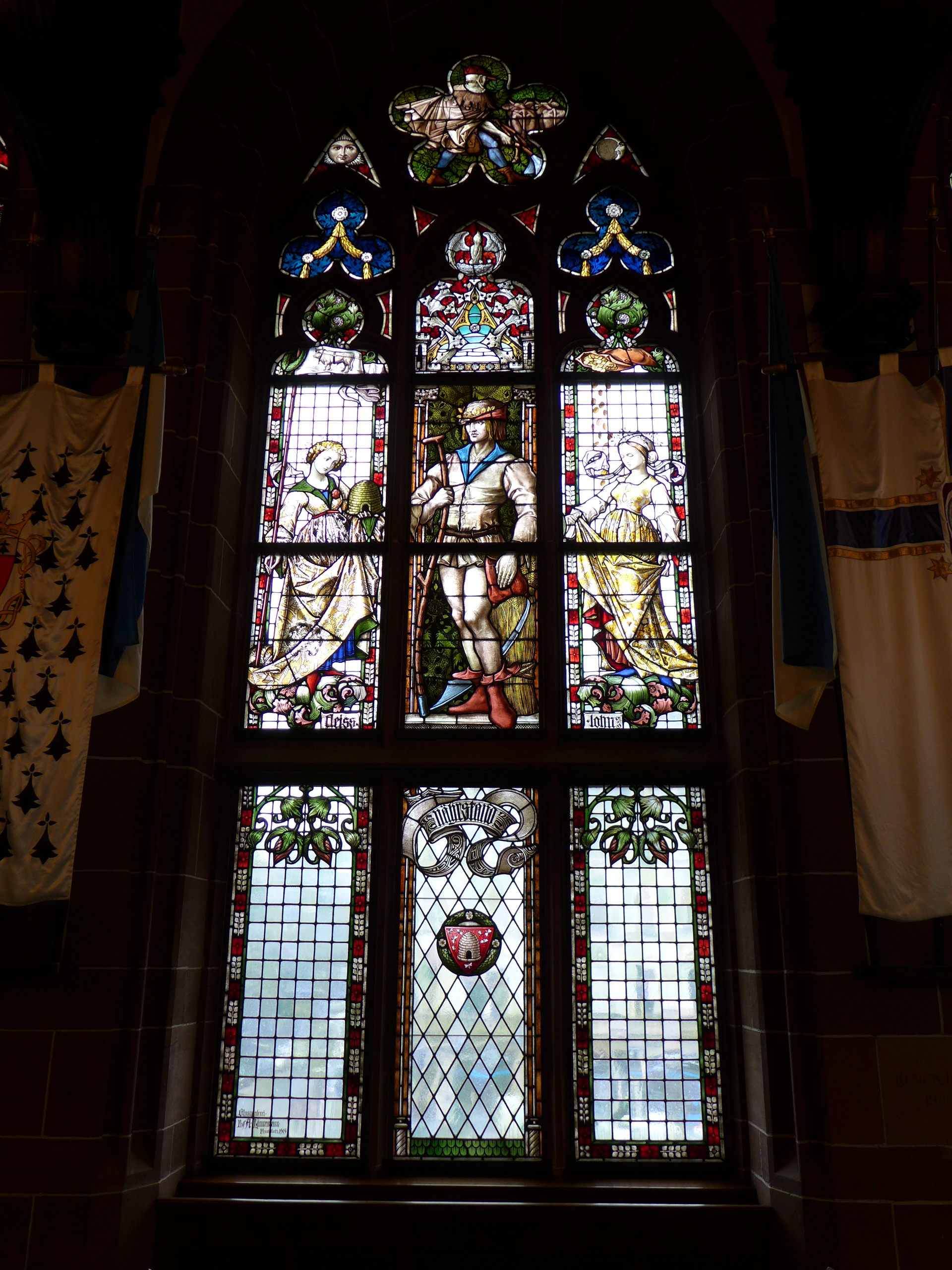 Rathaus St. Johann, Festsaal, Glasgemälde "Nährstand"